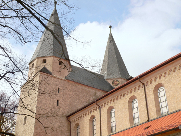 Stiftskirche St. Peter und Paul (Kaiserdom) Königslutter, Foto aufgenommen von Benutzer Benutzer:Axel Hindemith, April 2006